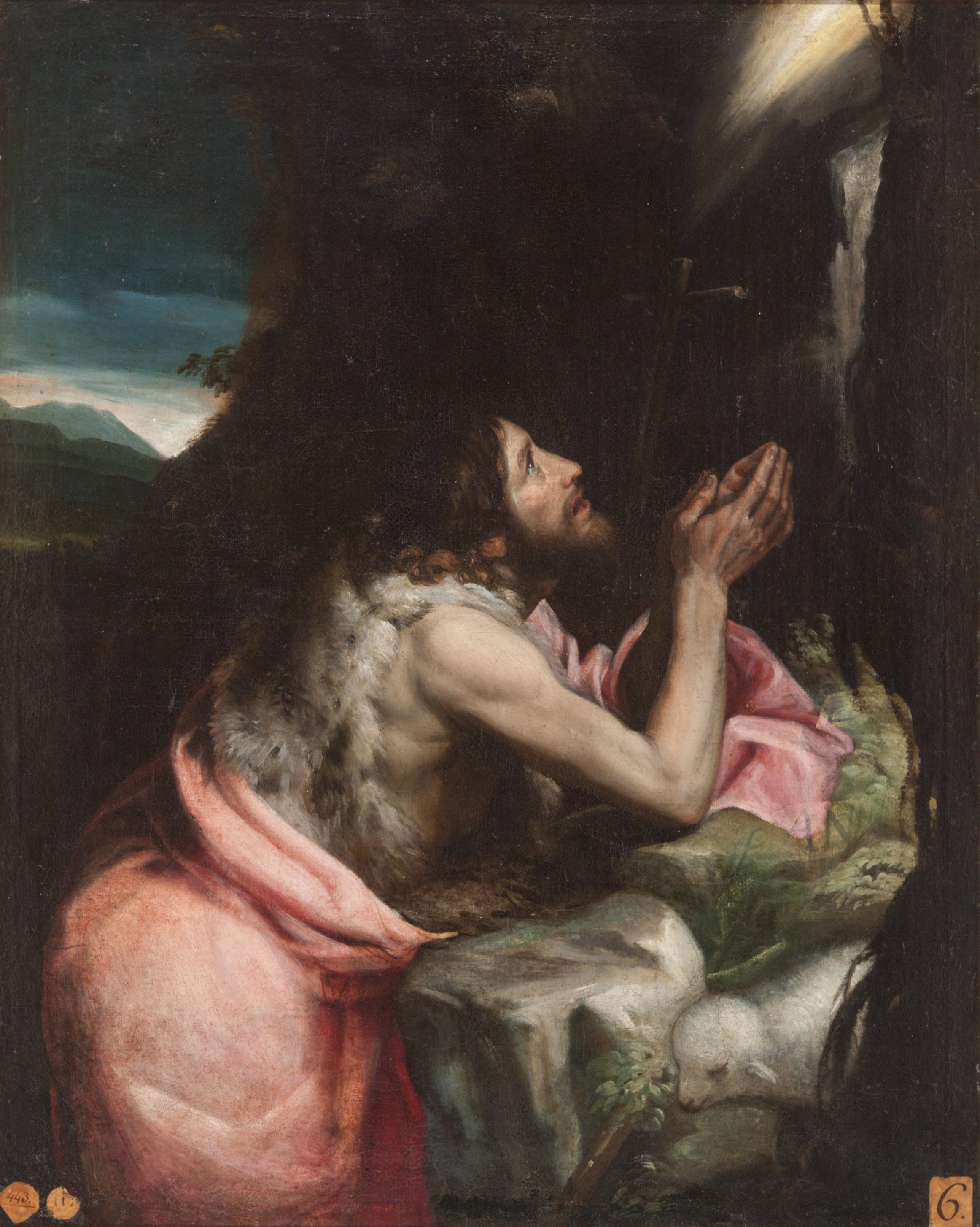 La obra representa al profeta San Juan Bautista, precursor del Mesías, en actitud orante.